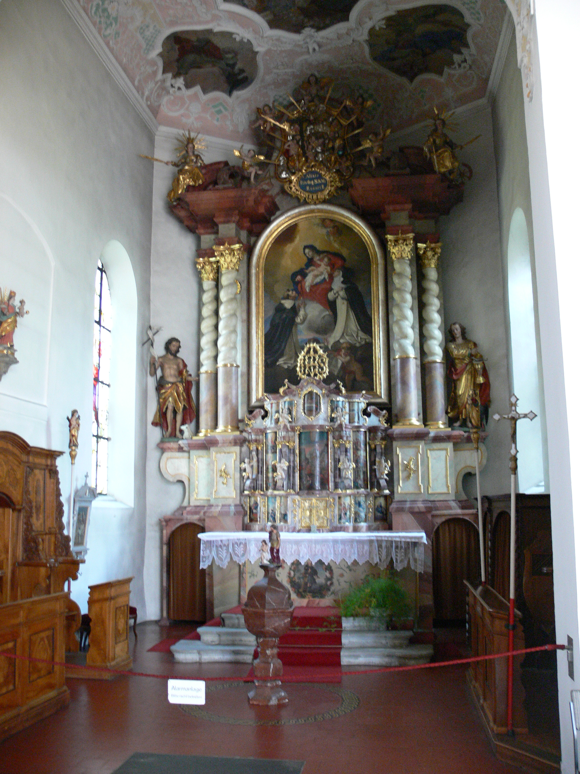 Pfarrkirche St. Jakobus, Brochenzell, Gemeinde Meckenbeuren, Bodenseekreis Chorraum, Rosenkranzaltar von Hans Georg Winkel (Bregenz), 1683/1684 aus dem ehem. Dominikanerinnenkloster Löwental bei Friedrichshafen, seit 1817 in Brochenzell